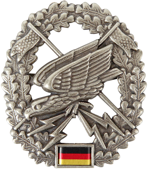 Barettabzeichen der Fernspähtruppe der Bundeswehr Barettfarbe: Bordeaux Maße: Hoch: 53mm Breit: 46mm Ausführung: altsilber, Metall